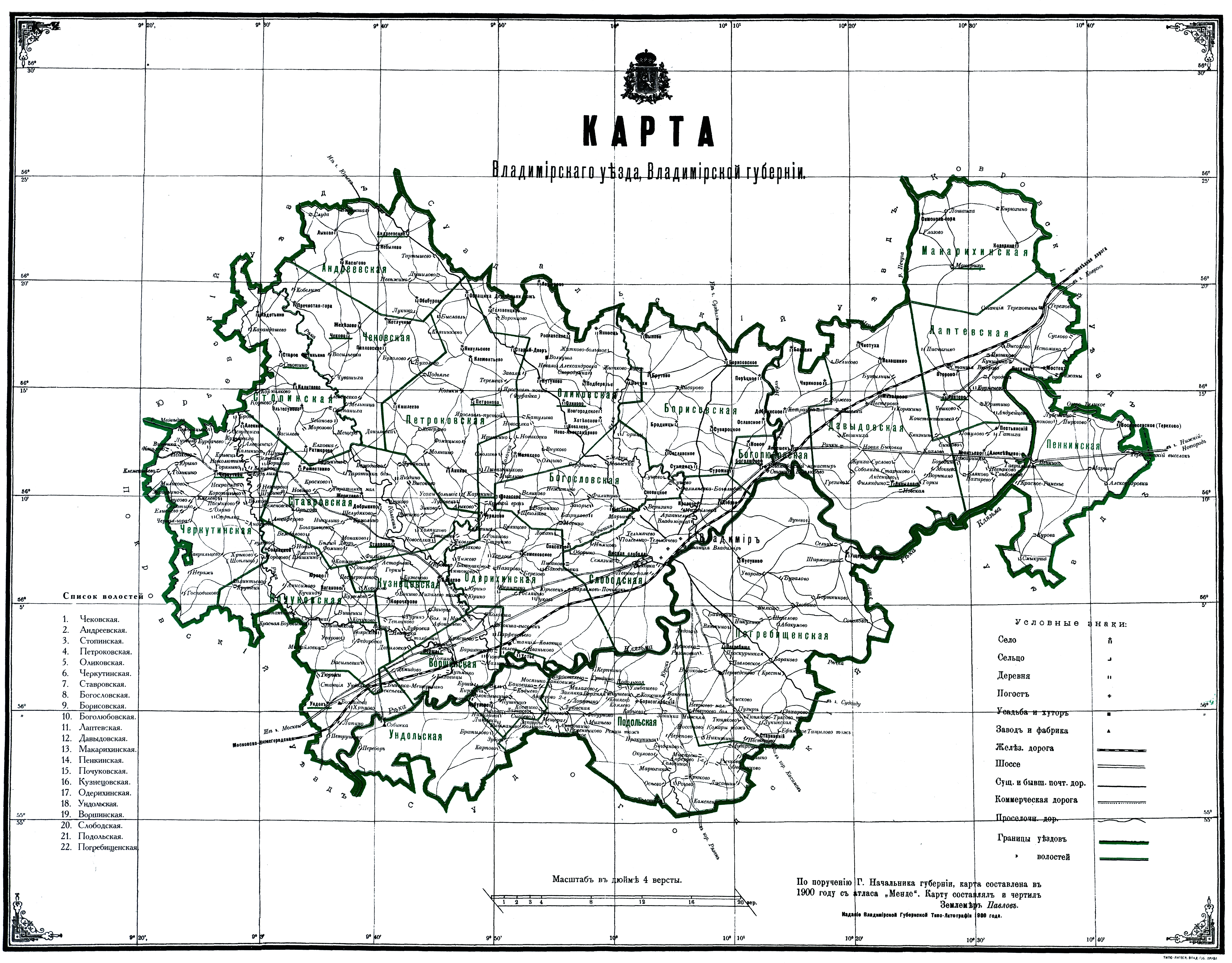 Карта Владимирского уезда 1900 года